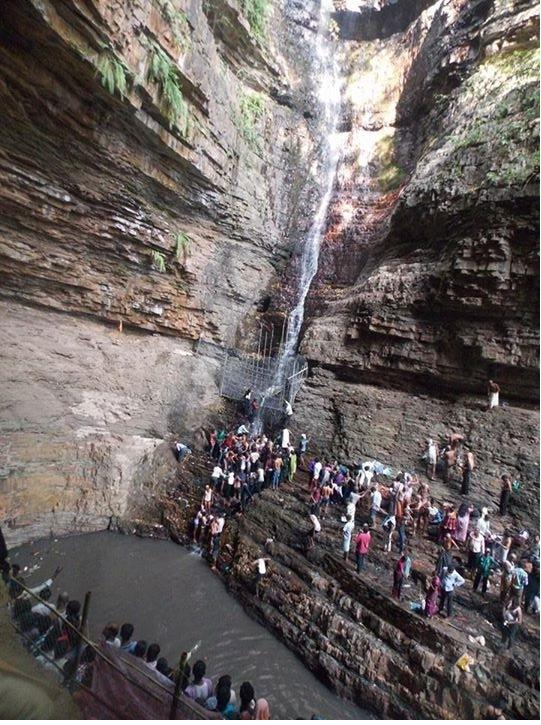 సలేశ్వర తీర్థం